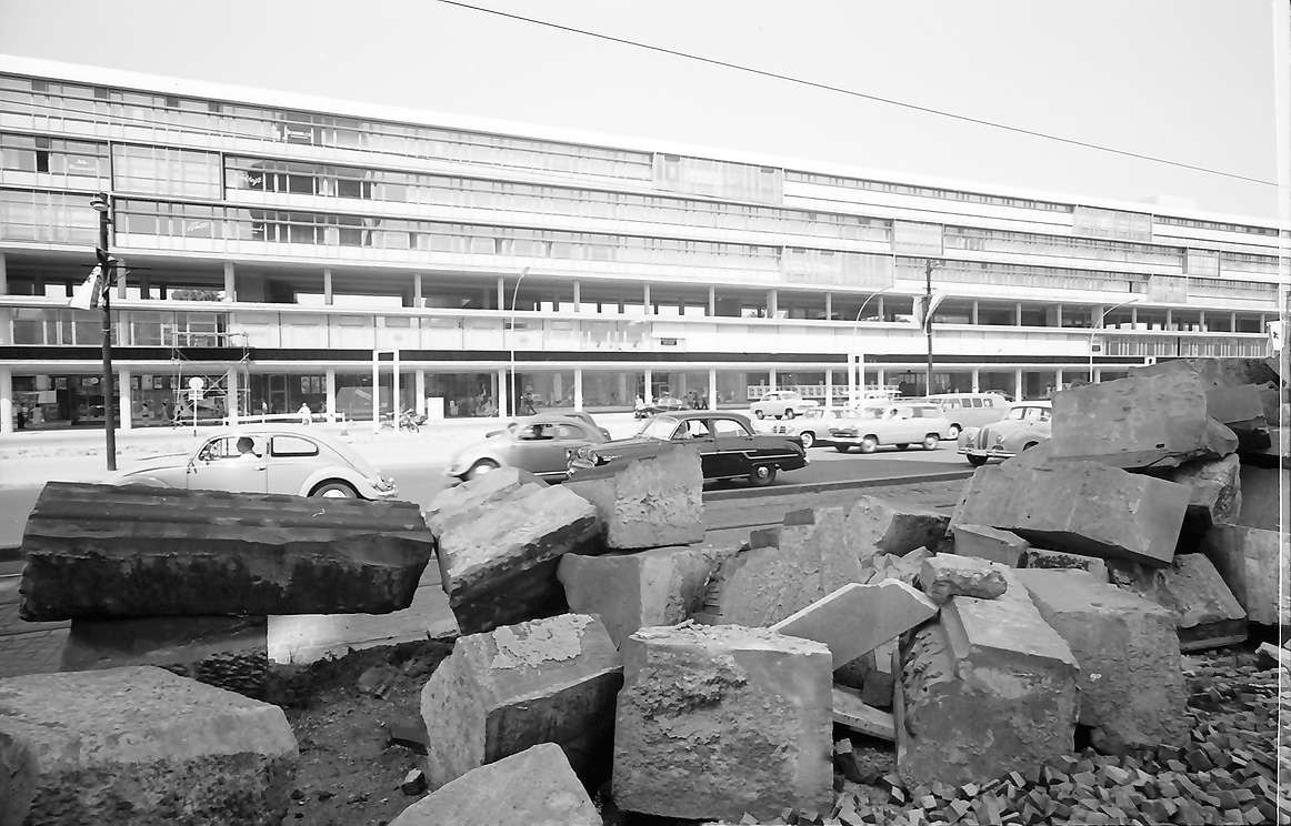 Blick über die Trümmer der Kaiser-Wilhelm-Gedächtniskirche auf dem Breitscheidplatz auf das Bikini-Haus in Berlin-Charlottenburg.